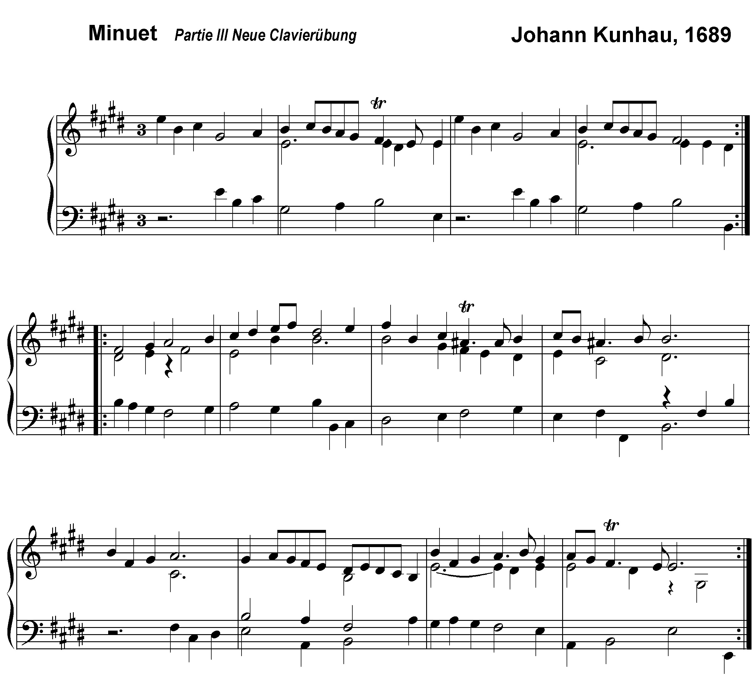 Partitura del minuet de la partie tres del Clavierübung de Johann Kuhnau